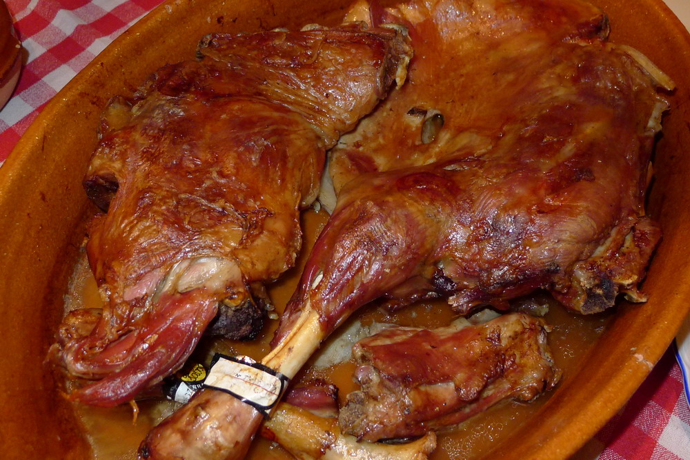 Plato de lechazo, alimento con «Indicación Geográfica Protegida», en Valladolid, España.